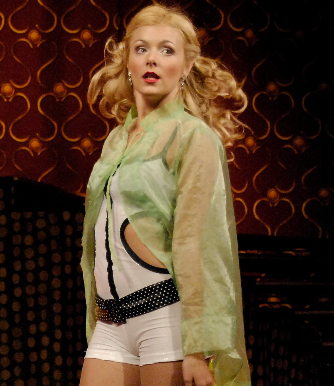 Српски (ћирилица): Bojana Stefanović crop